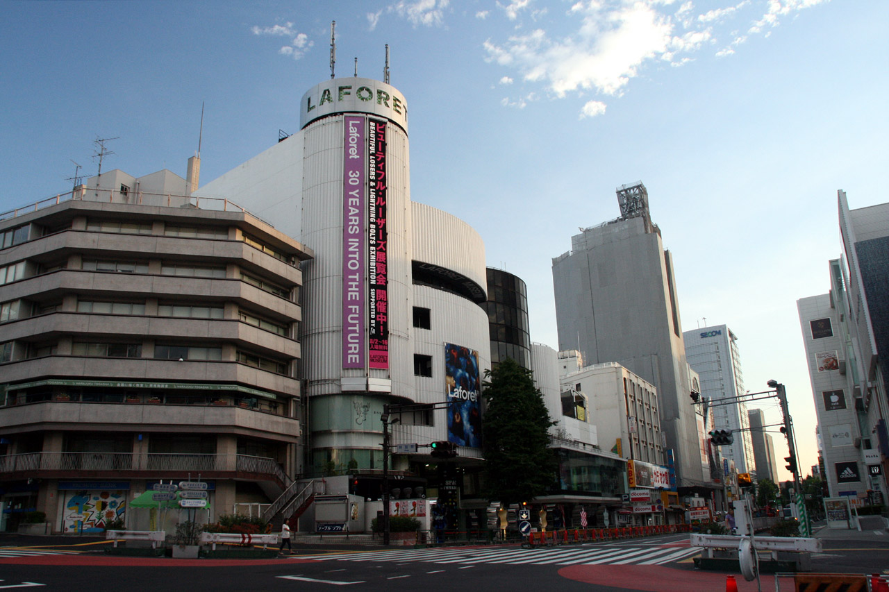 Laforet Harajuku in Tokyo